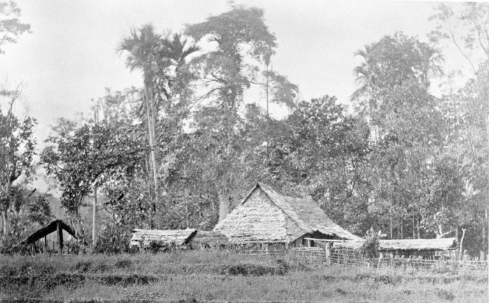 Foto. Deze foto is gemaakt tijdens de Sumatra Expeditie van 1877-1879. Landschappen uit de Padangsche Bovenlanden.. Negri-huis te Loeboe Gedang, Padangse Bovenlanden, Sumatra`s Westkust